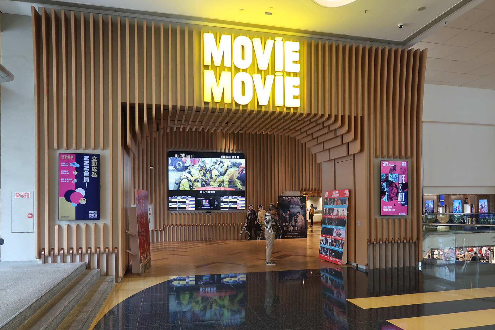 Movie movie cityplaza